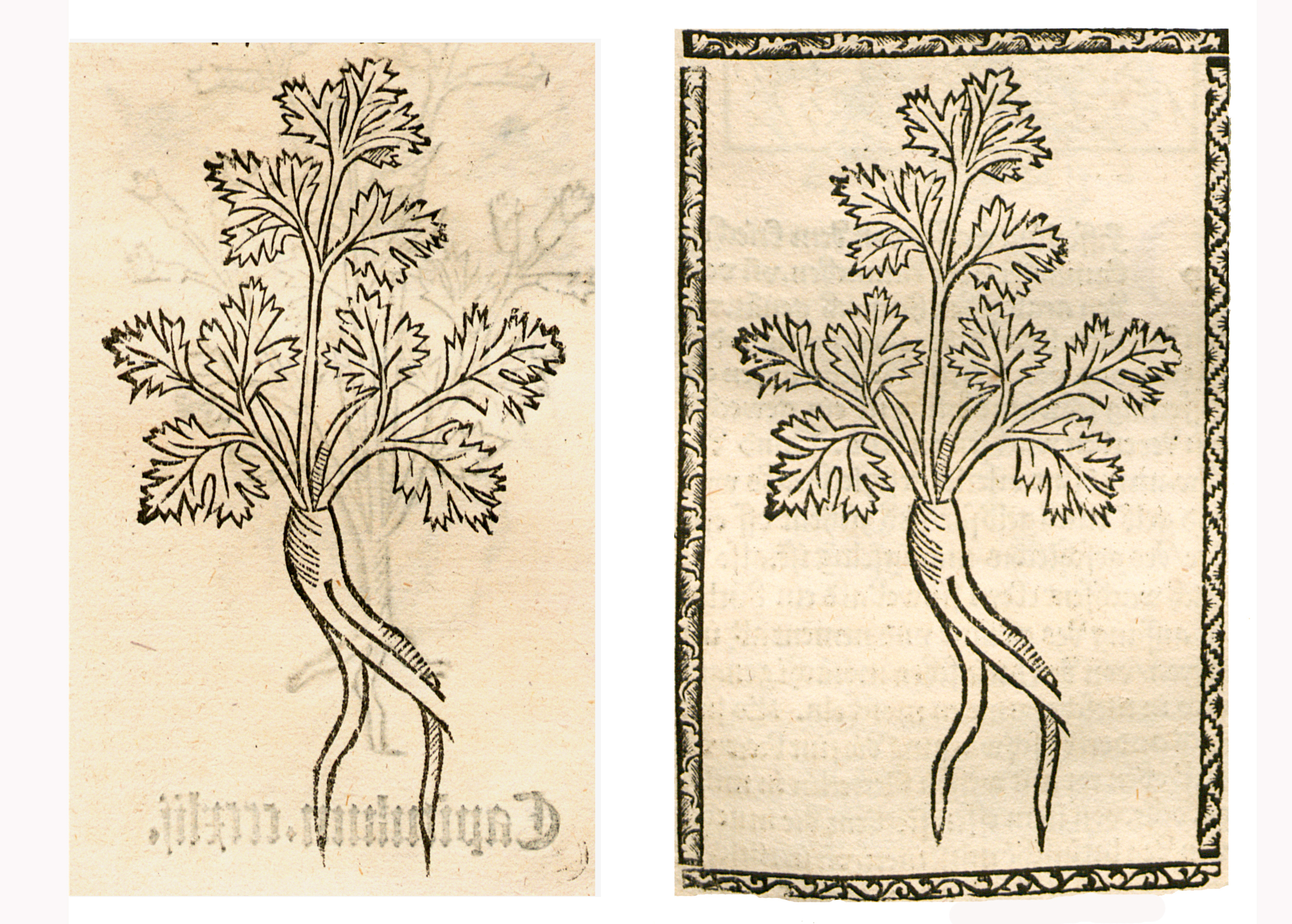 Abbildung von: Peterling (Petroselinum crispum)